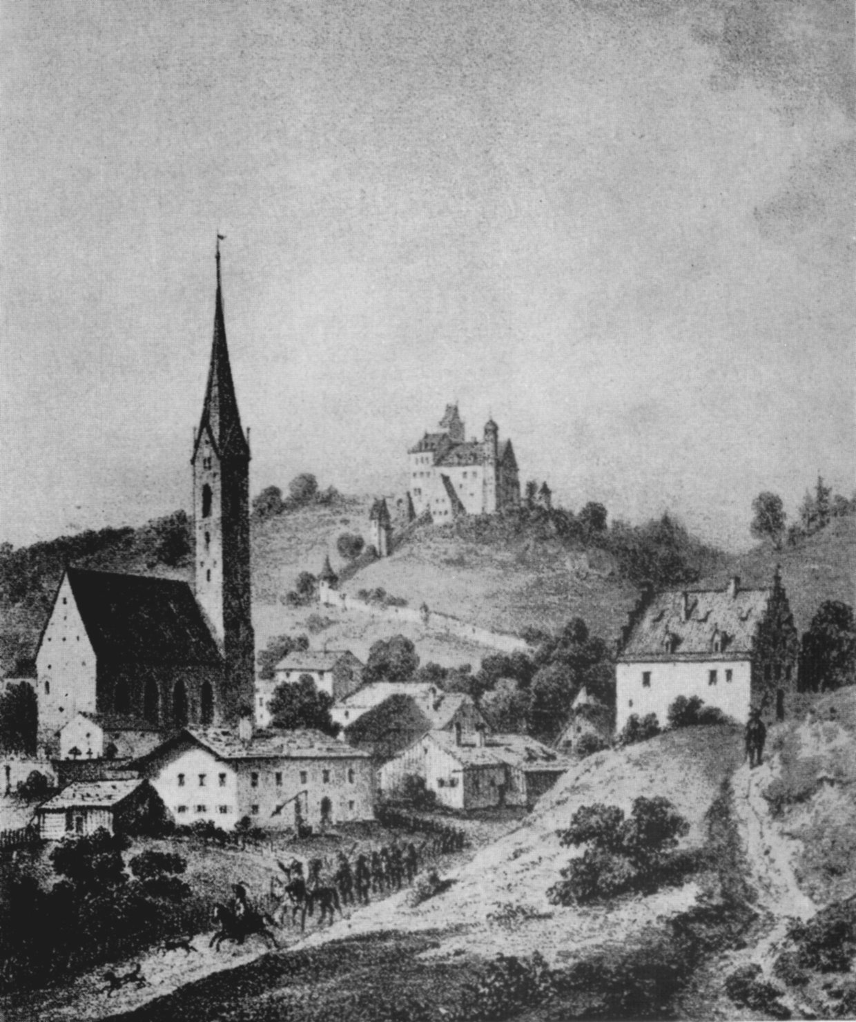 Pähl vor dem 30jährigen Krieg